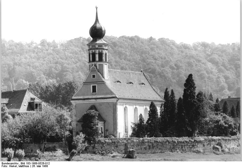 Dresden, Kirche "Maria am Wasser" ADN-ZB Hiekel 26.5.1988 Dresden: "Maria am Wasser", ein ehemaliges Schifferkirchlein, steht auf einer Anhöhe in Hosterwitz bei Pillnitz. Ihre jetzige Gestalt erhielt die ursprünglich gotische Hallenkirche 1774. Auch im Innern ist das Gebäude gut erhalten.